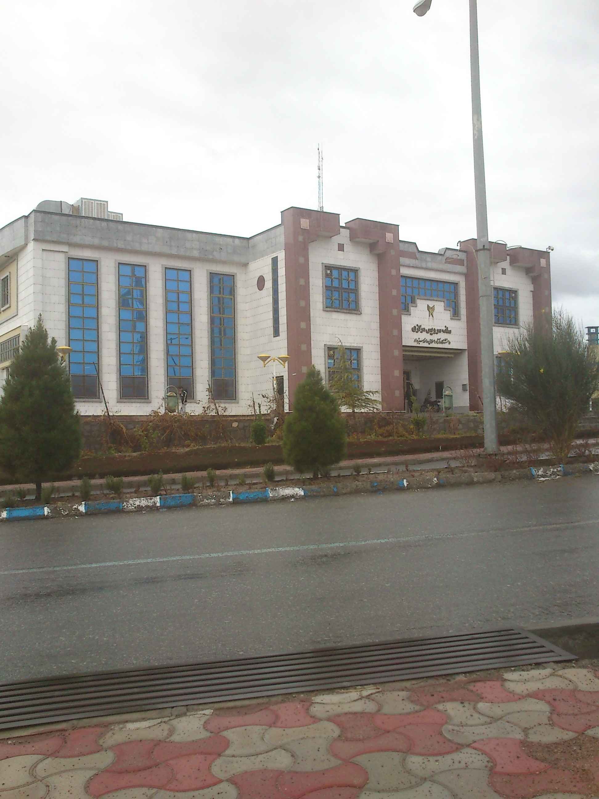 سلف سرویس مرکزی